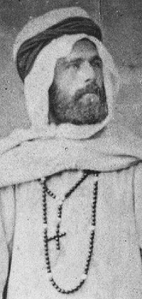 R. P. Alfred Louis Delattre (1850-1932) des Missions africaines du cardinal Lavigerie, archéologue.